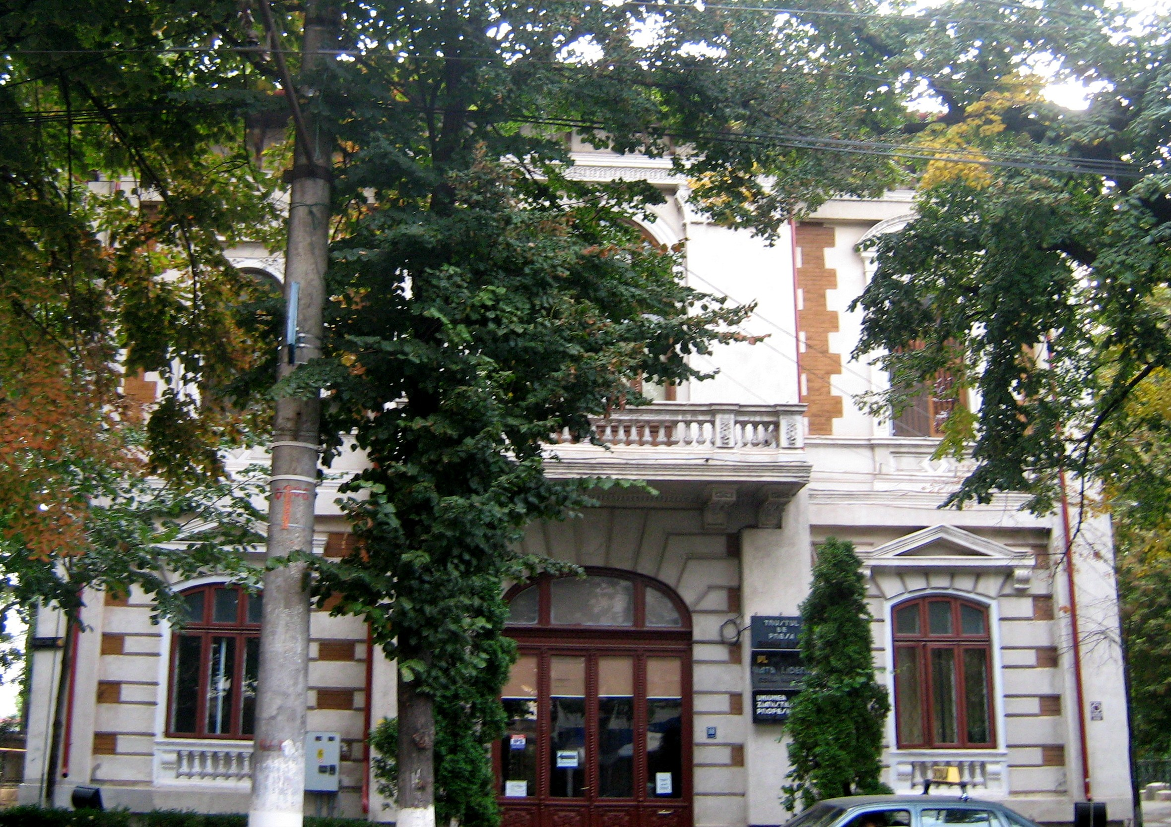 Casa Costache Plesnila azi redactia Viata Libera